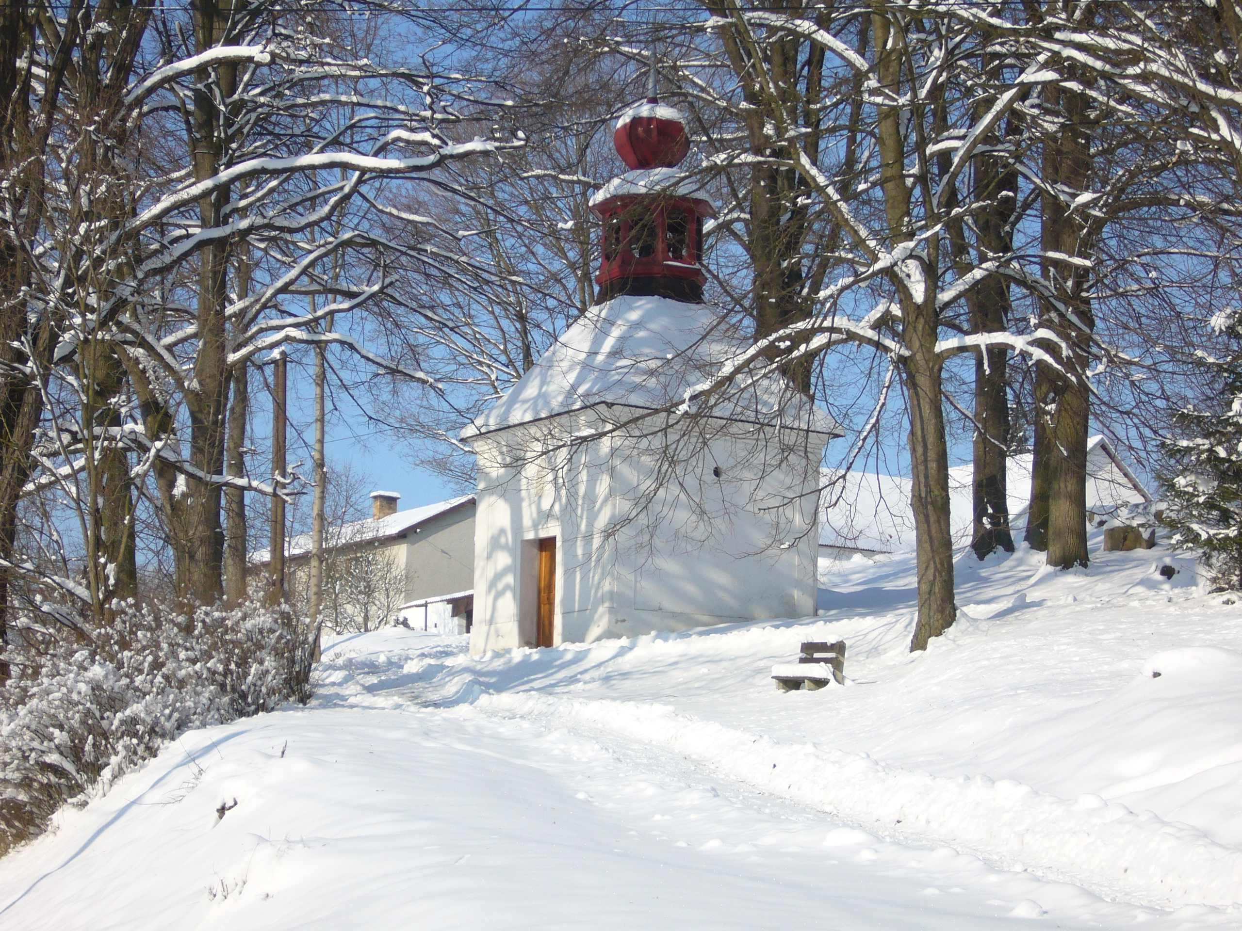 Kaplička svaté Anny